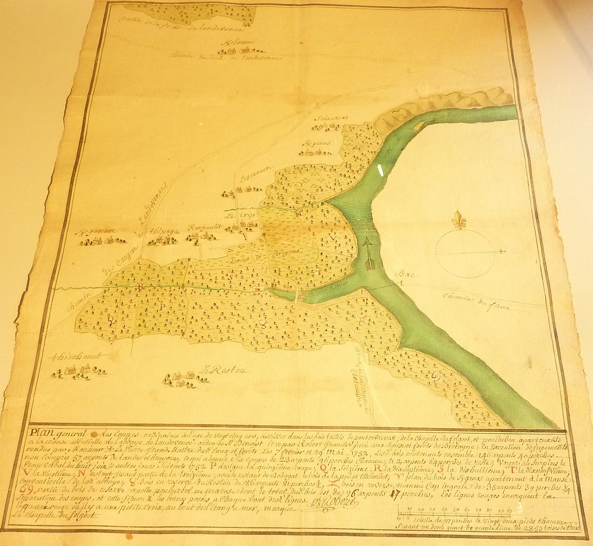 Plan d'une partie des bois appartenant à l'abbaye de Landévennec (plan dessiné par l'arpenteur Jean-Baptiste Robert en 1751-1752 ; archives départementales du Finistère)